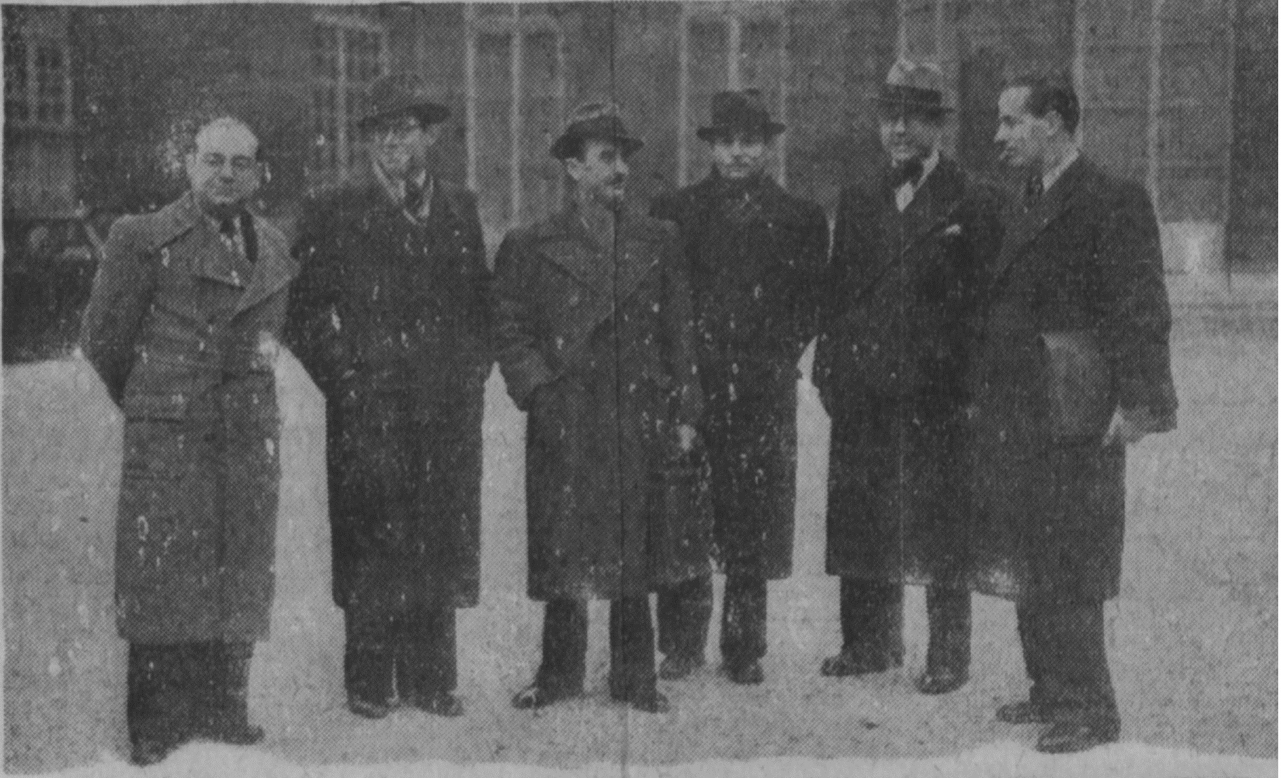 Dirigeants de la Confédération des syndicats professionnels français, au sortir d'une réunion à l'Hôtel Matignon avec le ministre d'Etat Ludovic-Oscar Frossard, le 18 février février 1938.